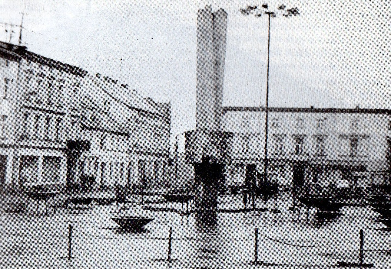 Rynek w Nakle nad Notecią w 1989r.